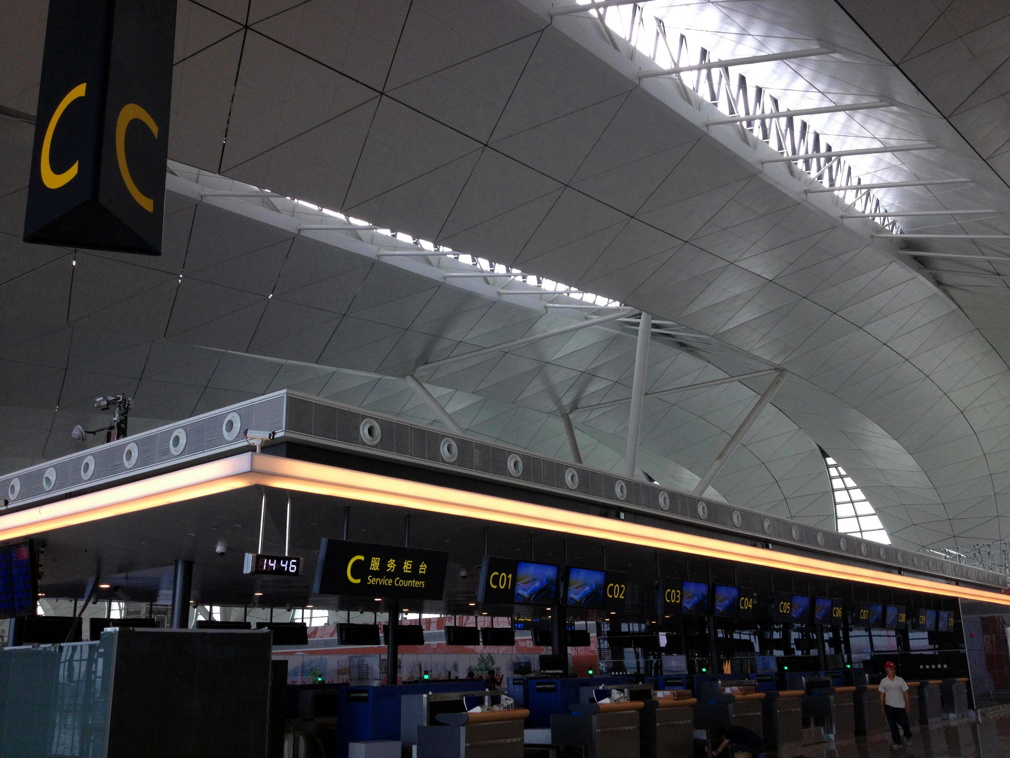 中文（中国大陆）: 沈阳桃仙国际机场第三航站楼柜台